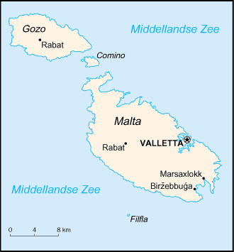 Nederlandse vertaling CIA-kaart door Danielm